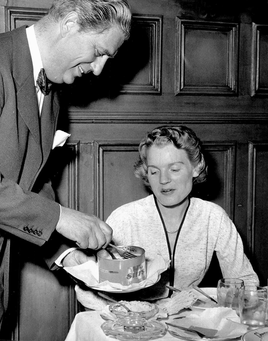 Restaurang Tennstopet på Vattugatan, källarmästarn Gunnar Wiberg serverar surströmming för fröken Anna-Lisa Persson.